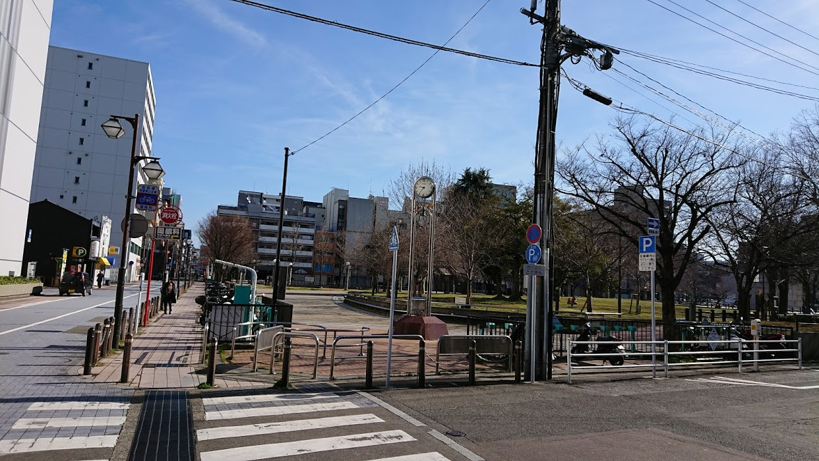 福岡市博多区にある冷泉公園